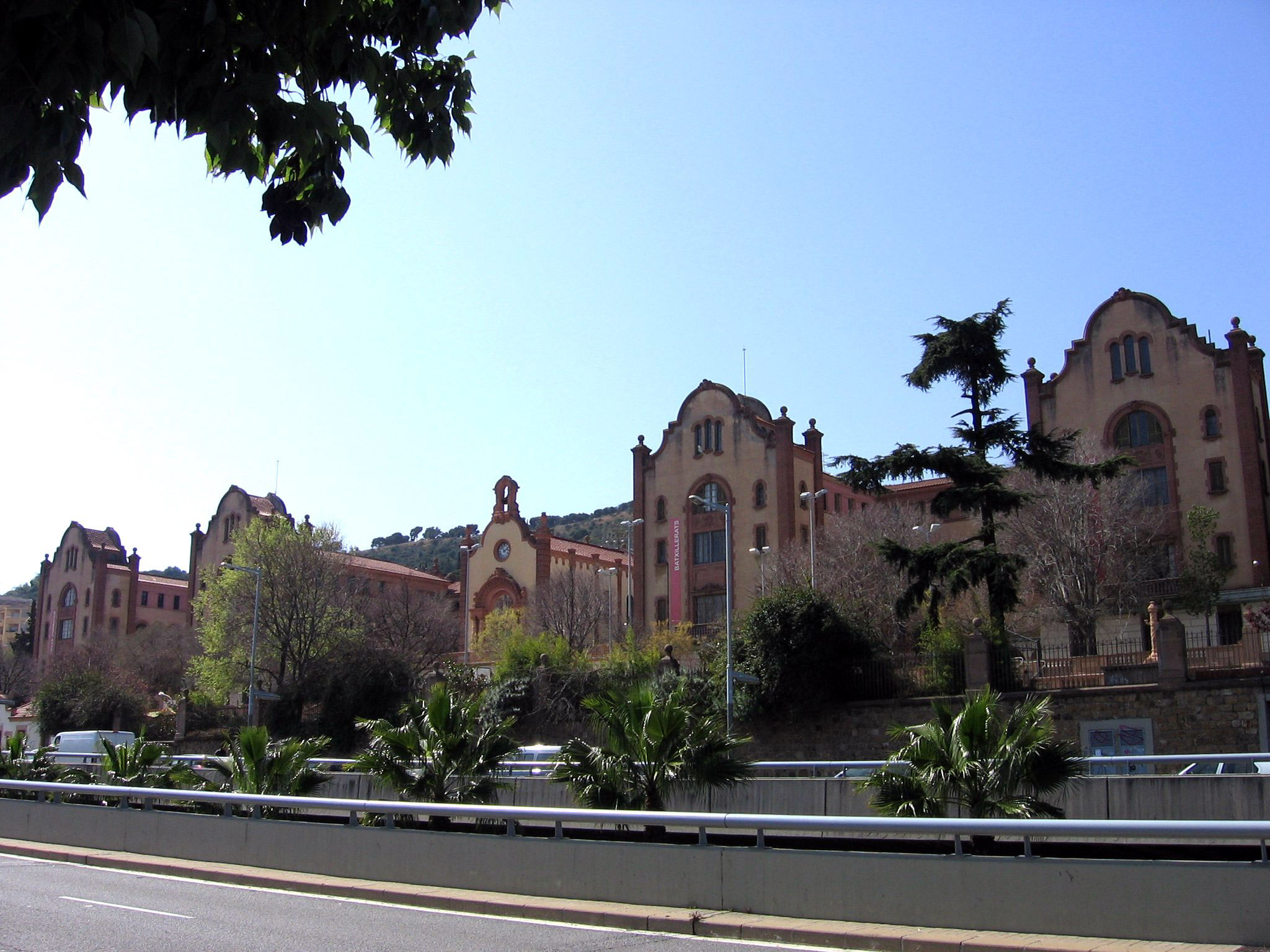 Patronato Ribas, Barcelona.